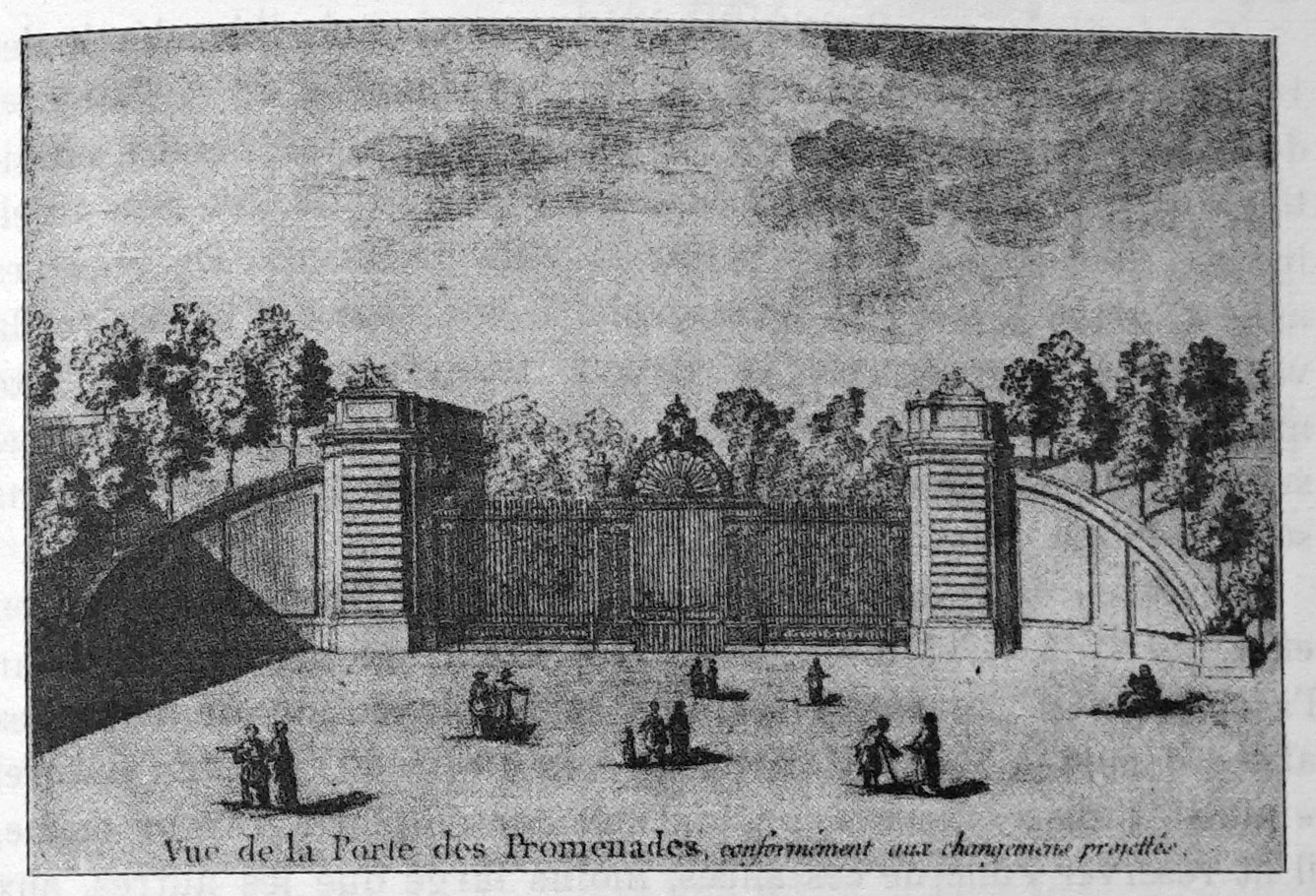 de Reims.